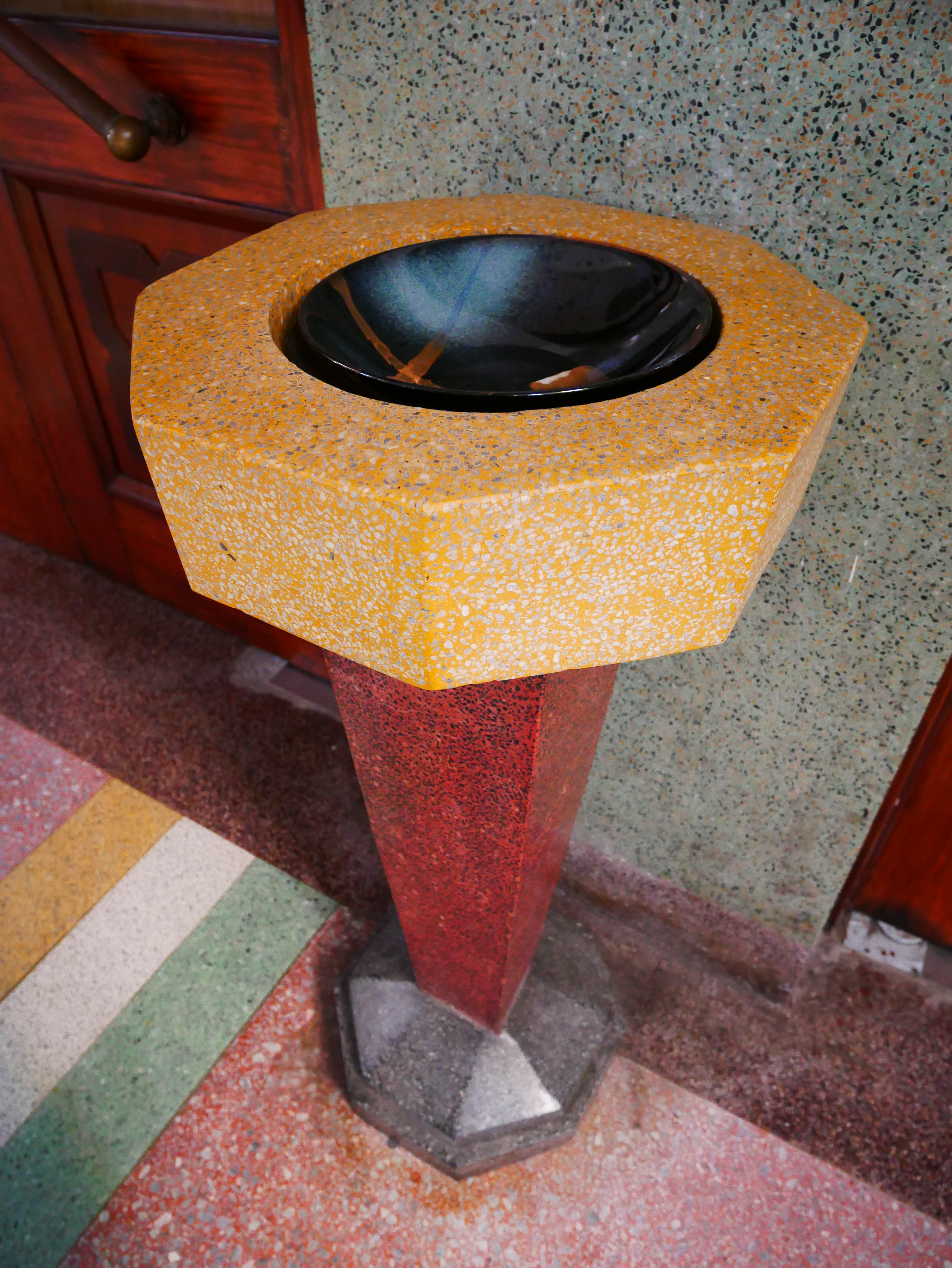 聖母聖心主教座堂聖水池，新竹市北區水田里